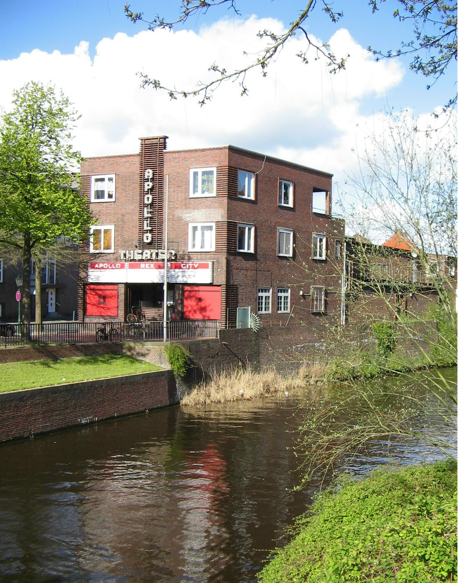 Apollo-Theater in Emden/Ostfriesland am 3. Mai 2016